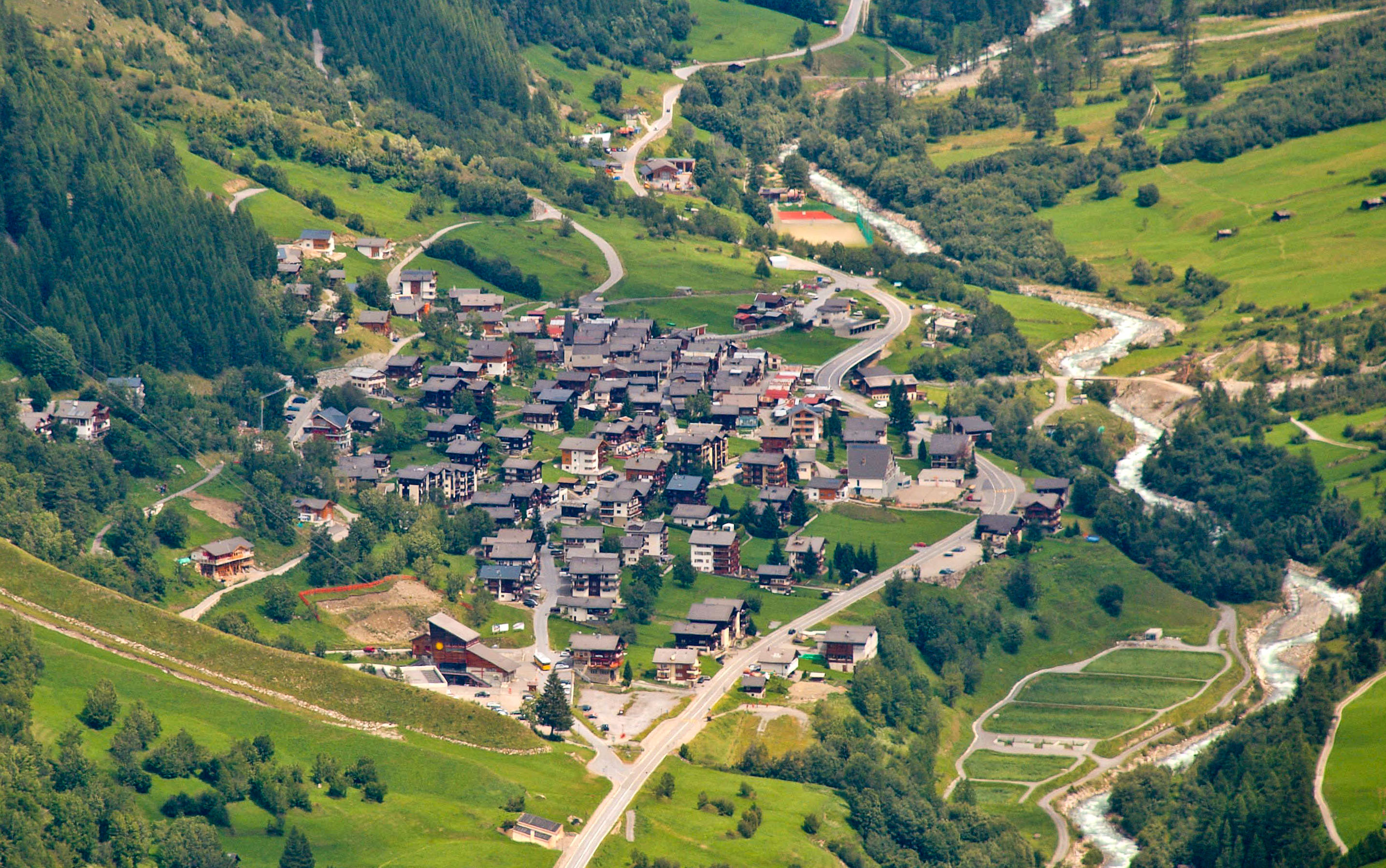 en.: Wiler at Lötschental, Switzerland; dt.: Wiler im Lötschental, Schweiz